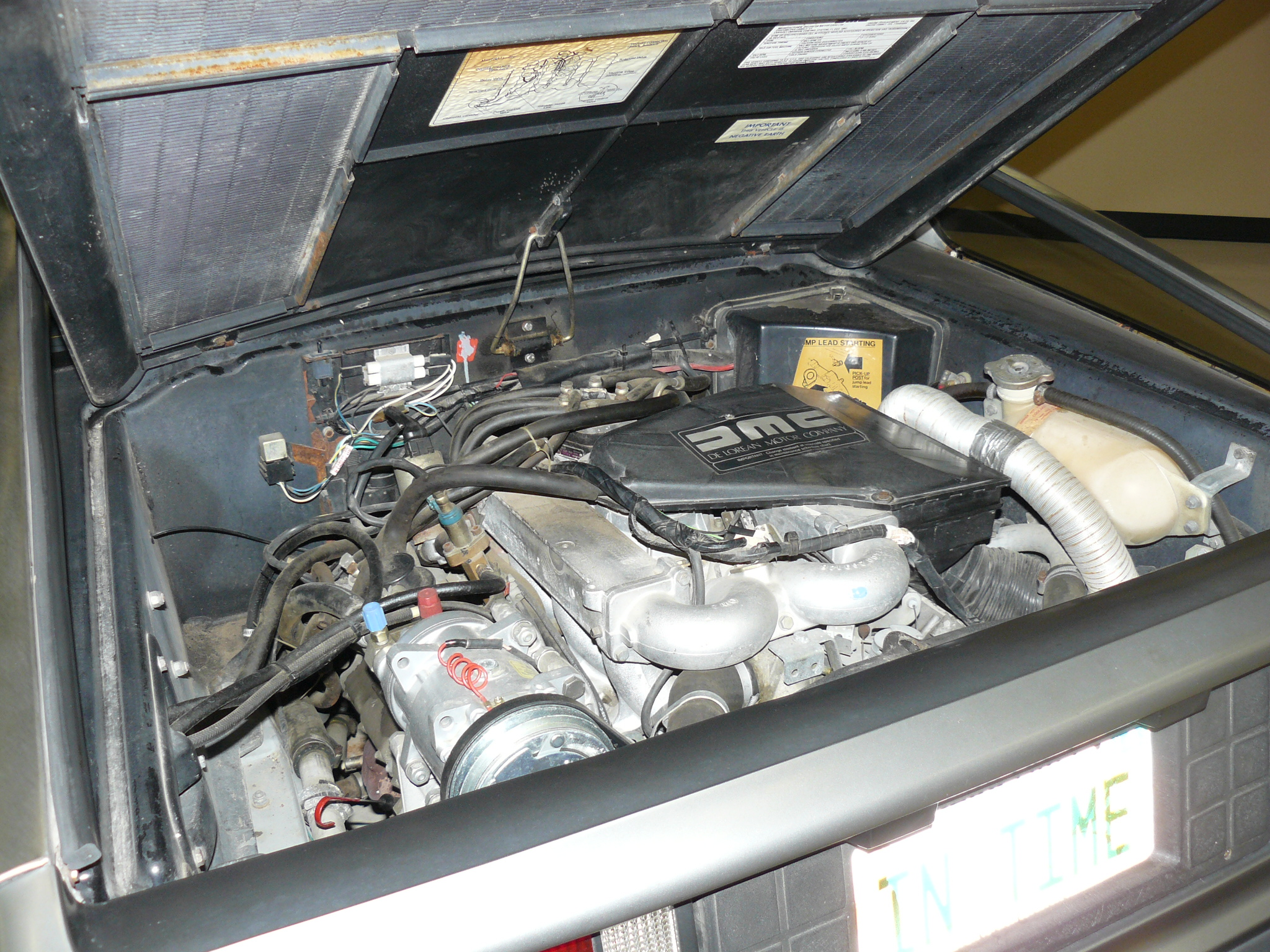 Musée de Kearney.